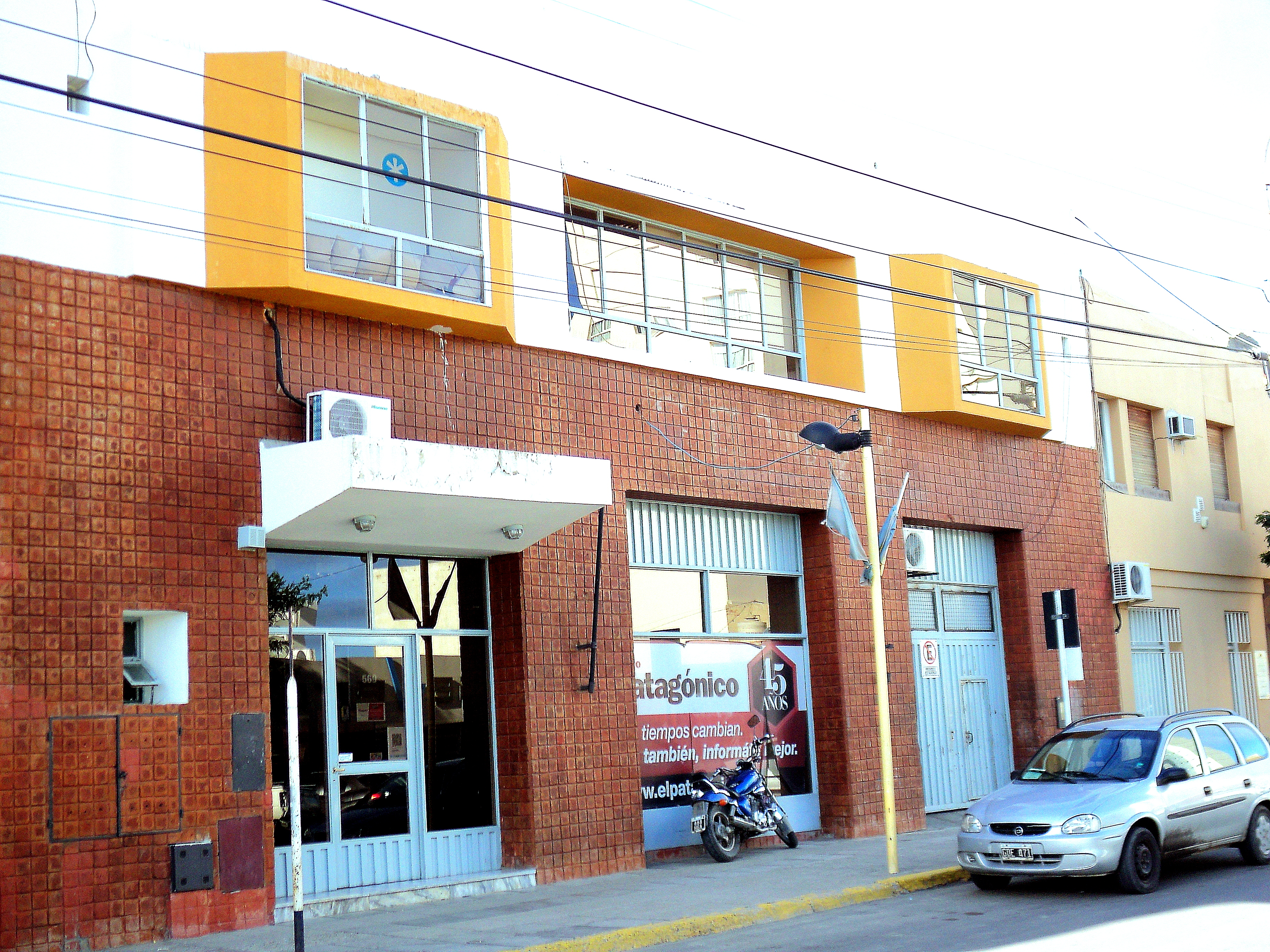 La planta de comercializacion y produccion del diario Patagonico